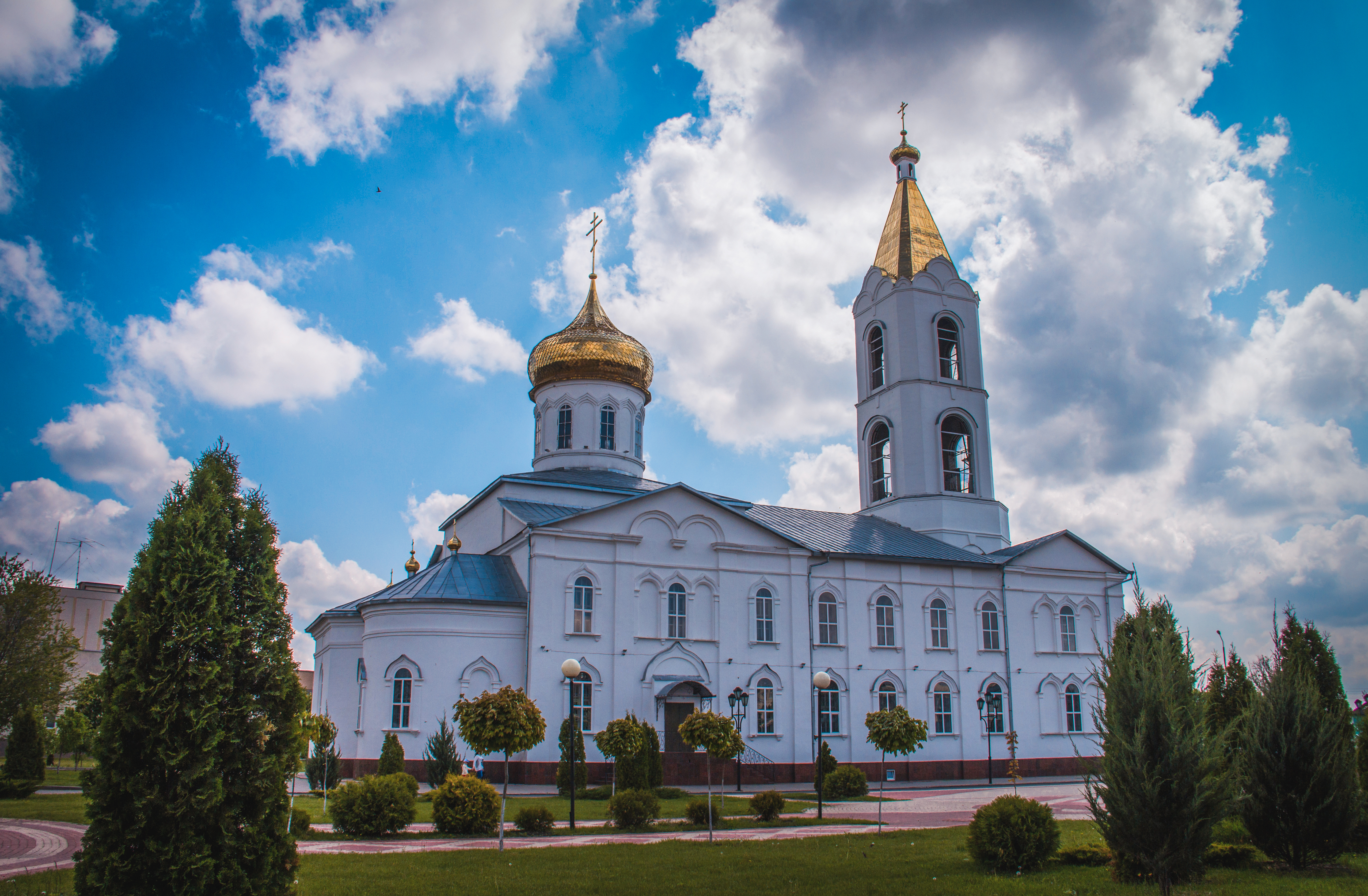 Церковь Троицы Живоначальной в Алексеевке